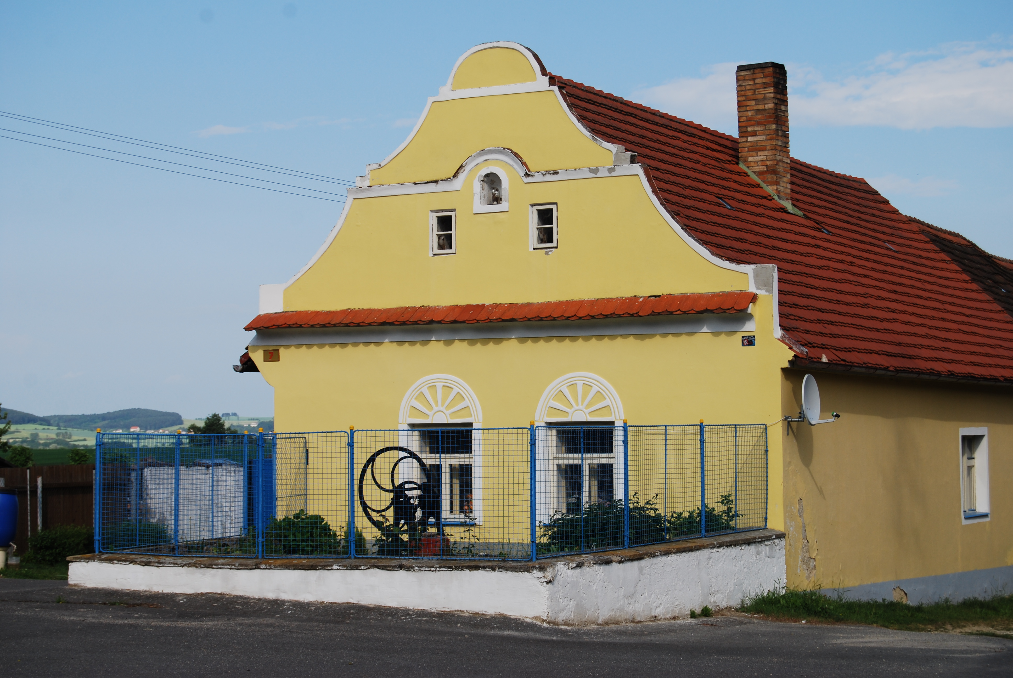 Usedlost v obci. Březí je malá vesnice, část obce Kluky v okrese Písek. Česká republika.